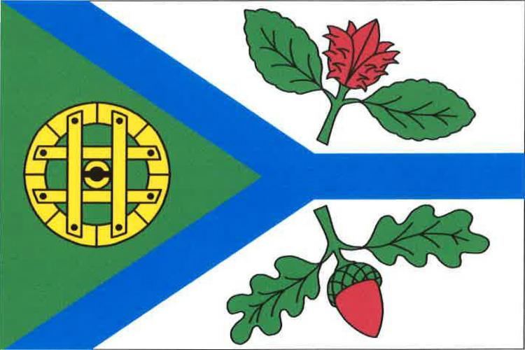 Heřmanov, okres Děčín, vlajka